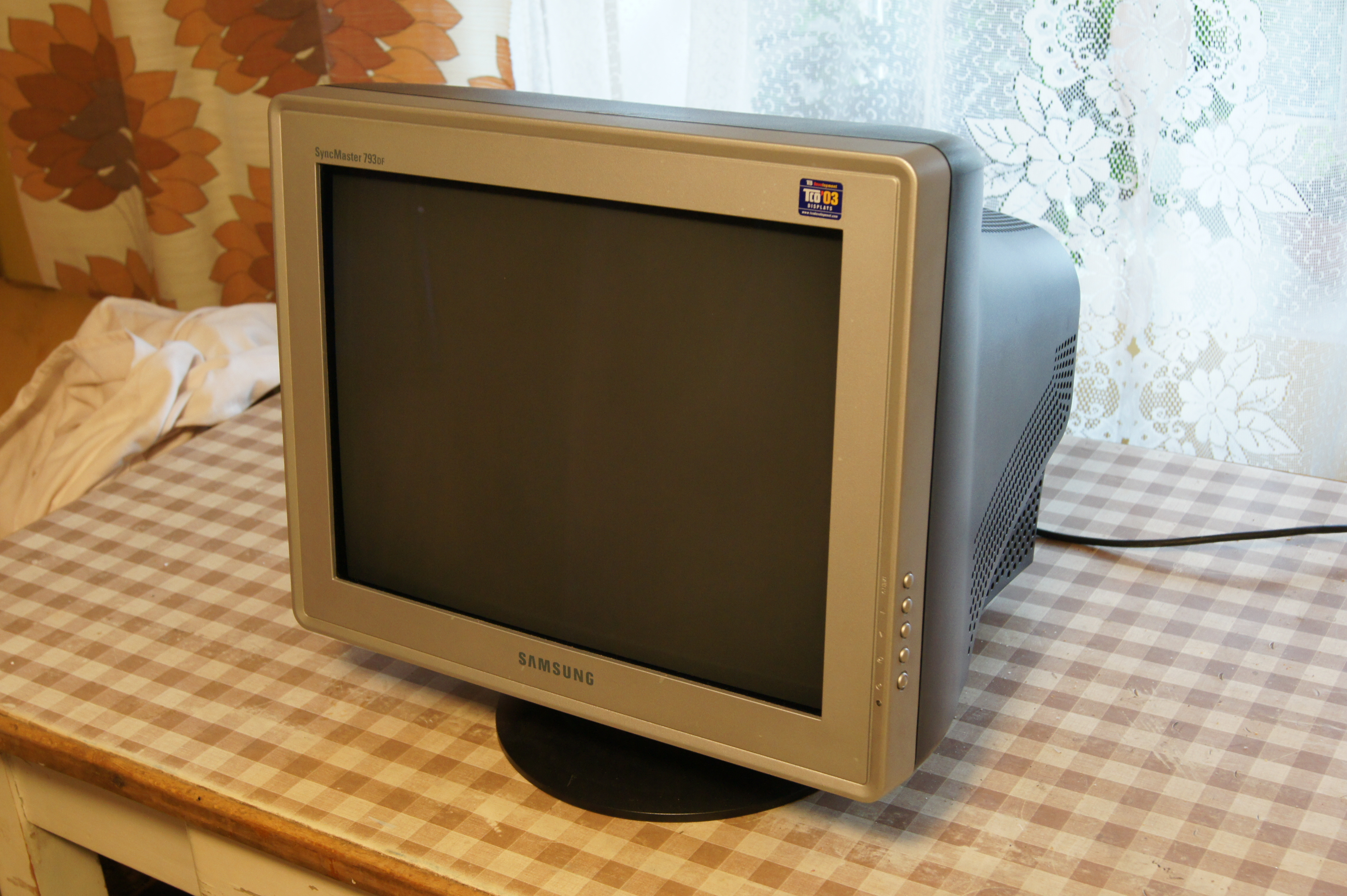 Monitor Samsung SyncMaster 793DF